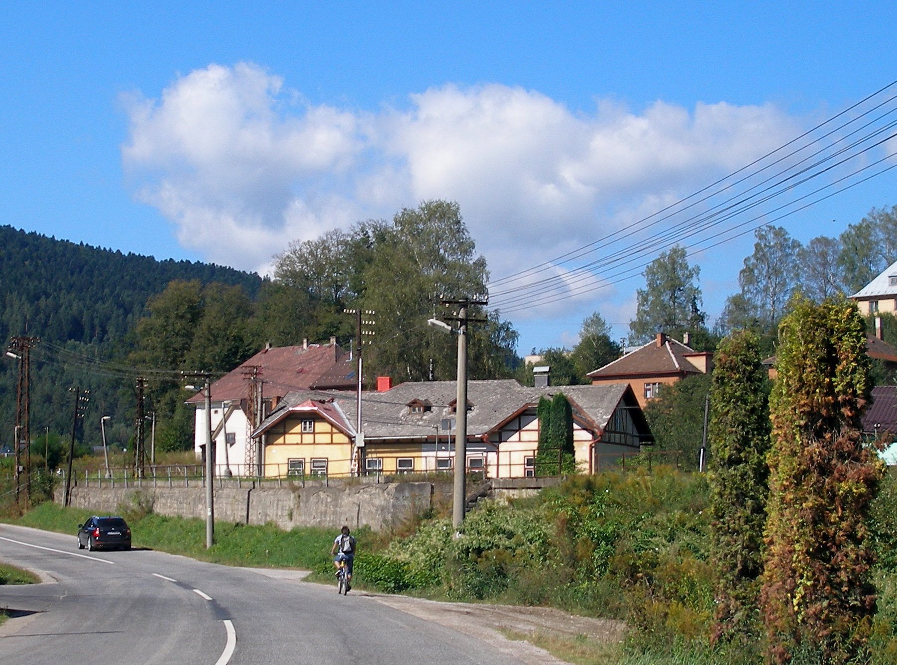 Spišská obec Prakovce. Okres Gelnica.